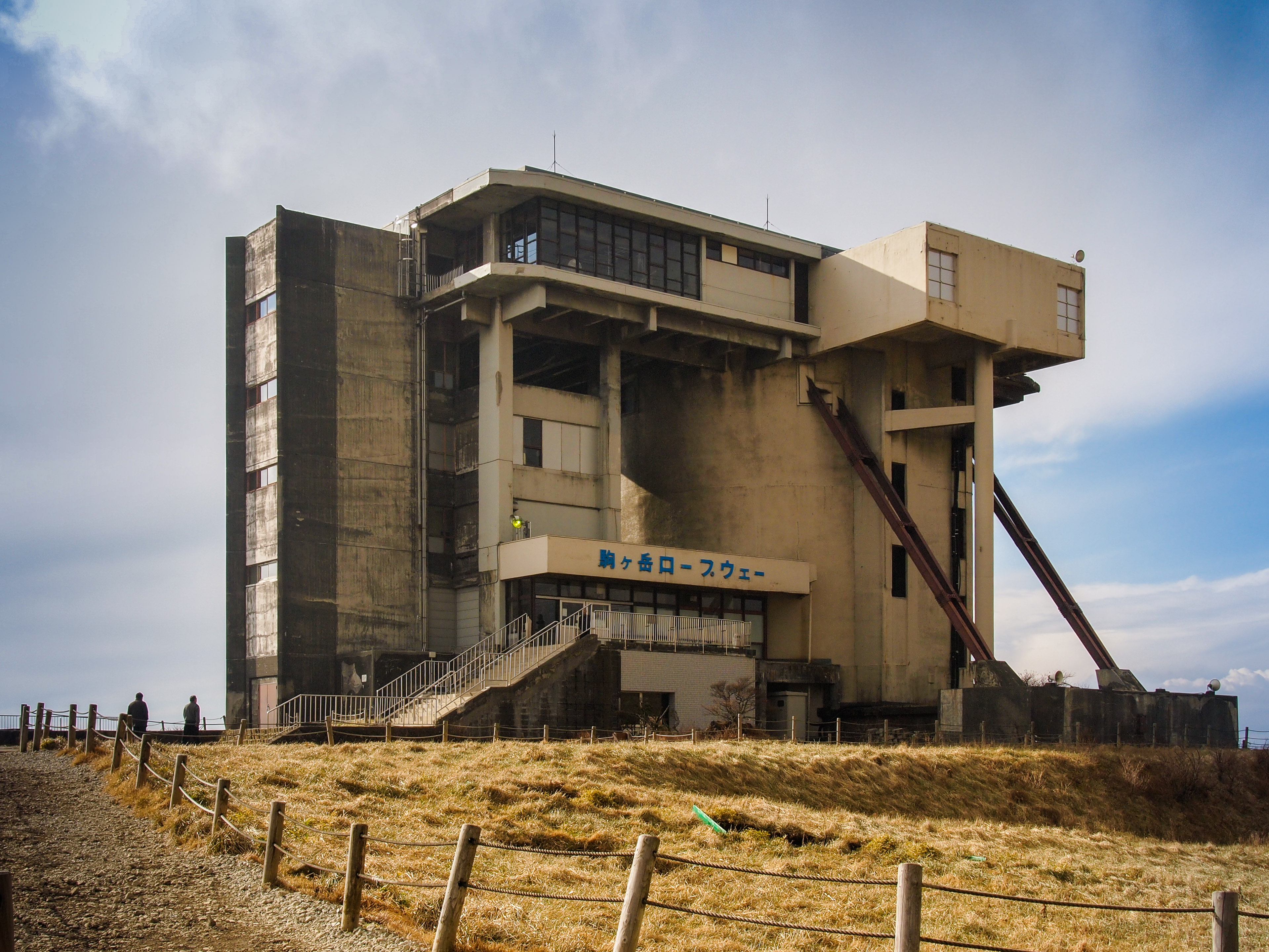 Komagatake-Chojo Station